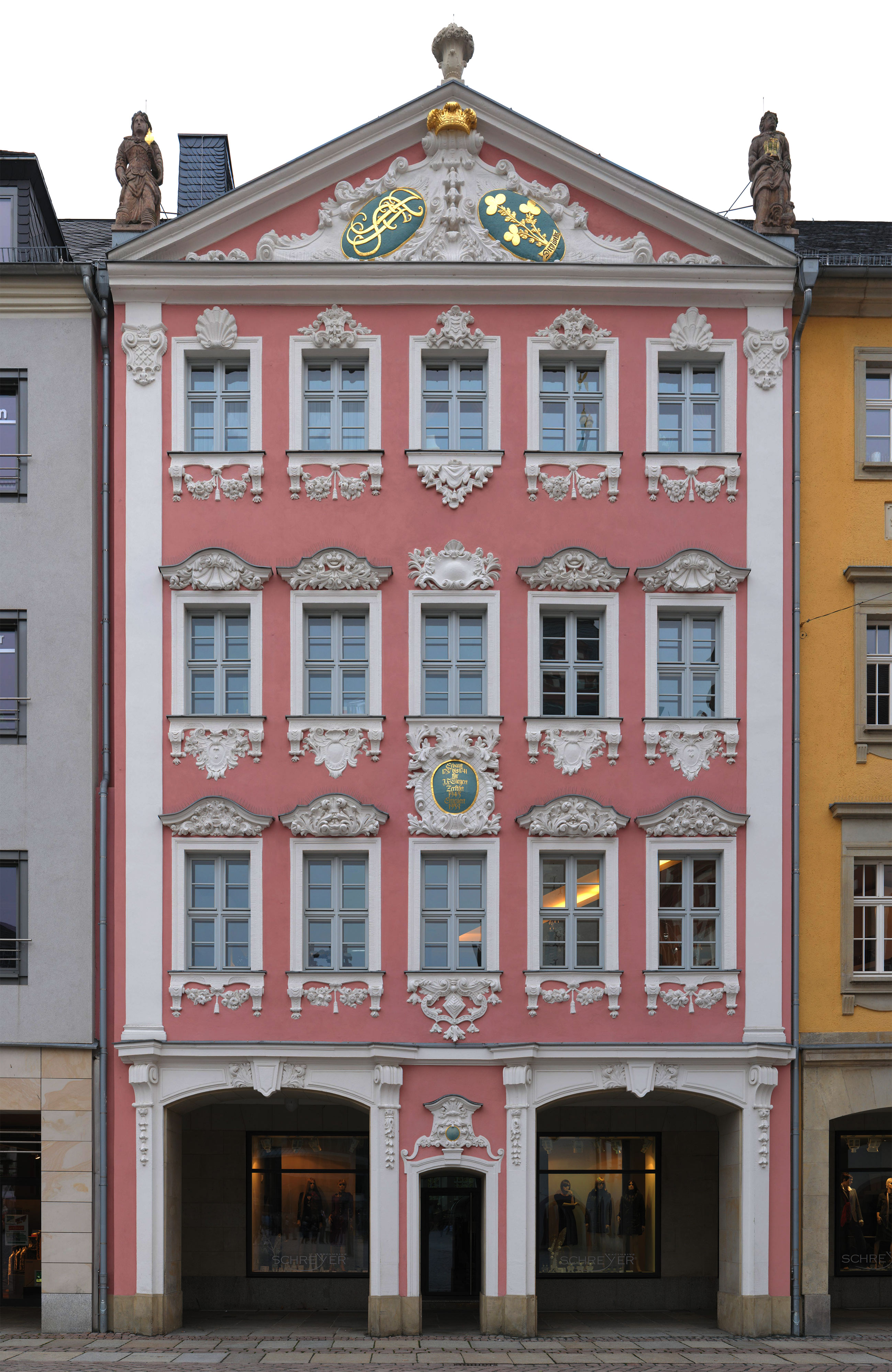 Siegertsches Haus am Chemnitzer Marktplatz